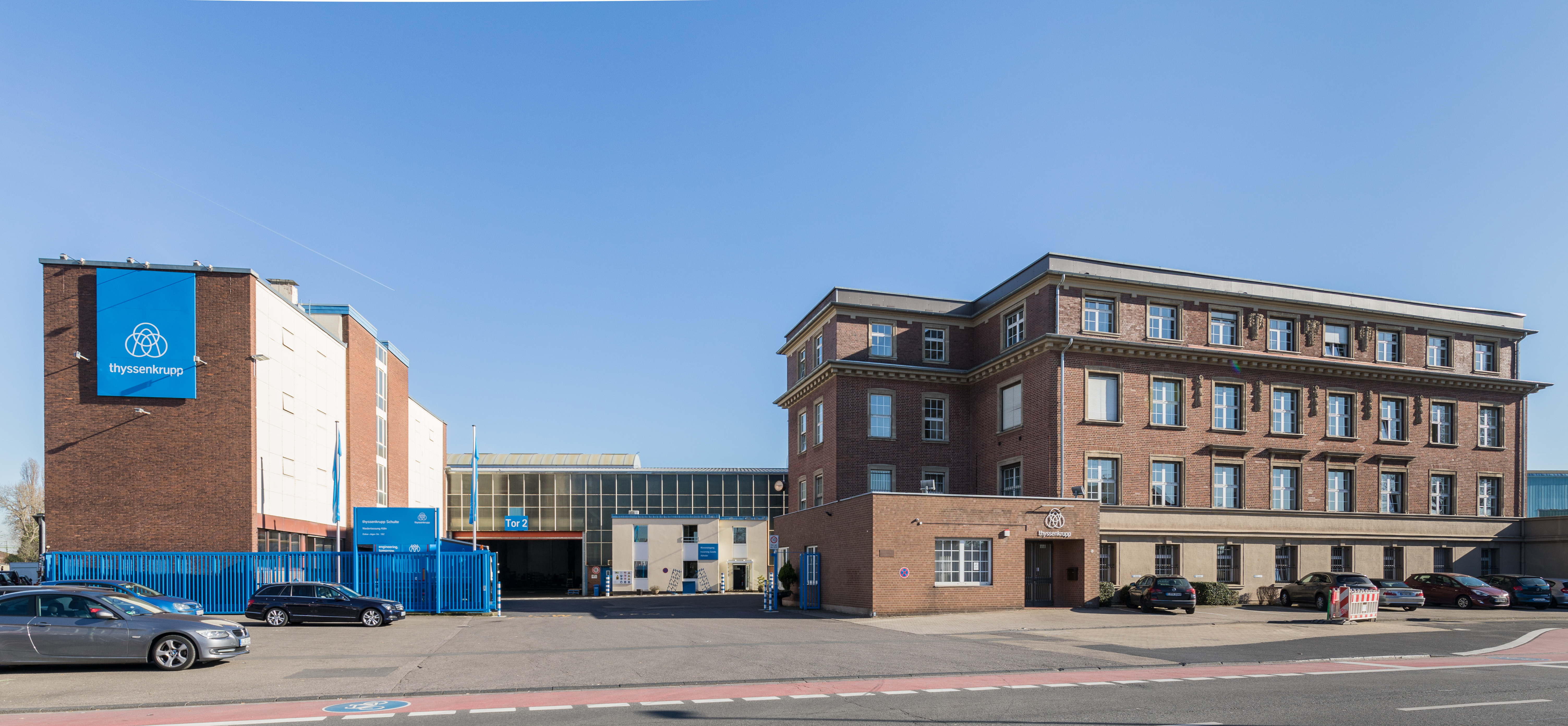 Thyssenkrupp Schulte, Niederlassung Köln, Oskar-Jäger-Str. 192. Rechts das denkmalgeschützte Verwaltungsgebäude.